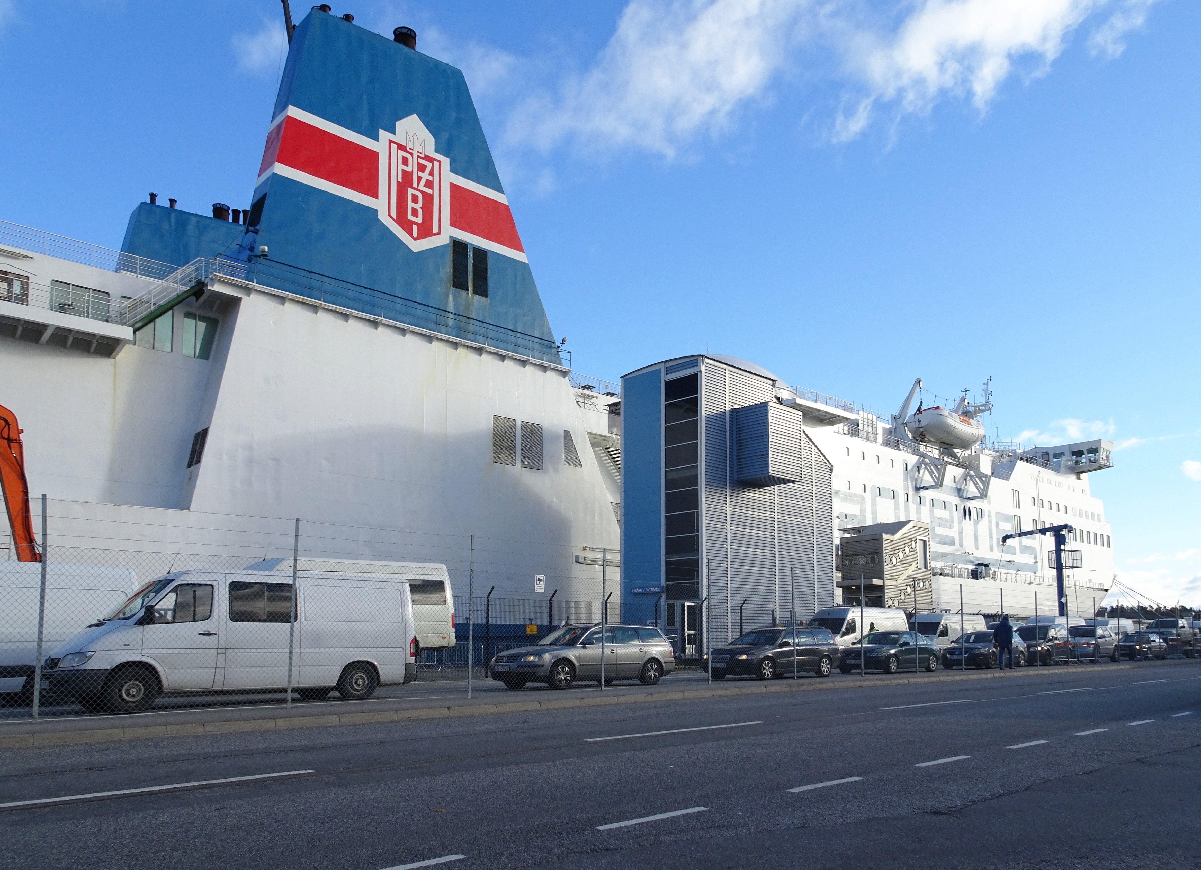 Nynäshamns hamn och färjeterminal